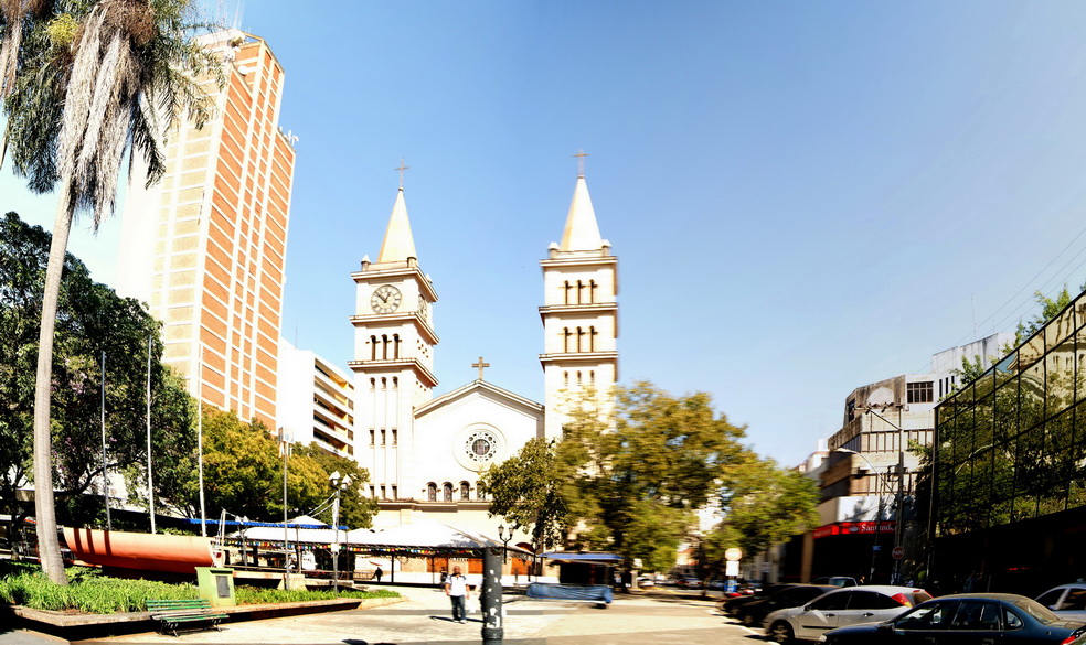 Imagem do município de Piracicaba, estado de São Paulo, Brasil.